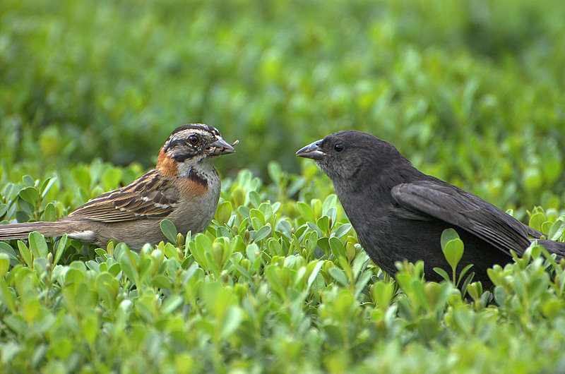 Parque da Independência, Museu do Ipiranga, São Paulo Este é um Vira-Bosta sendo criado pelo Tico-Tico.